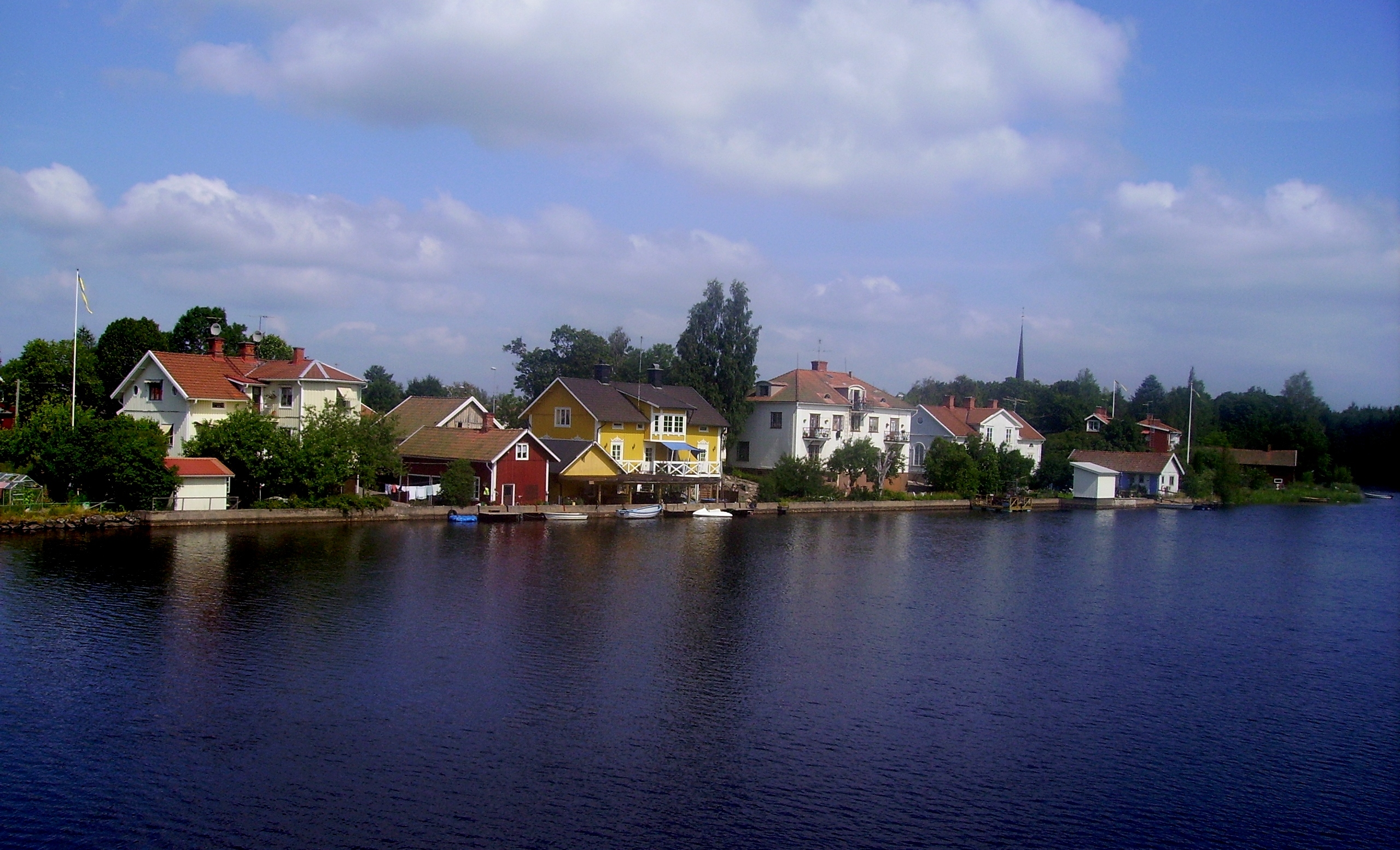 (C)Erik Andersson, Åtorps Utvecklingsgrupp, 2006.